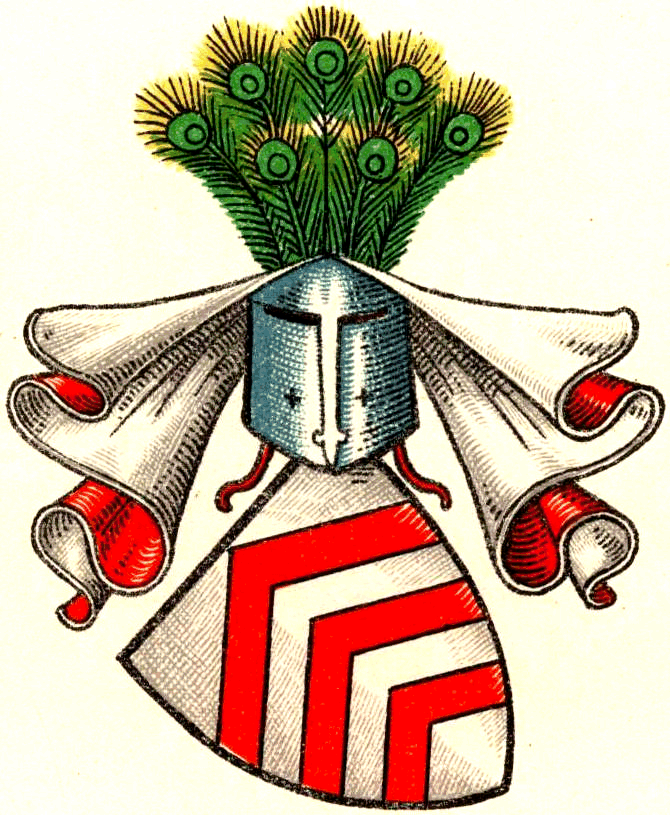 Stammwappen der Grafen von Ravensberg